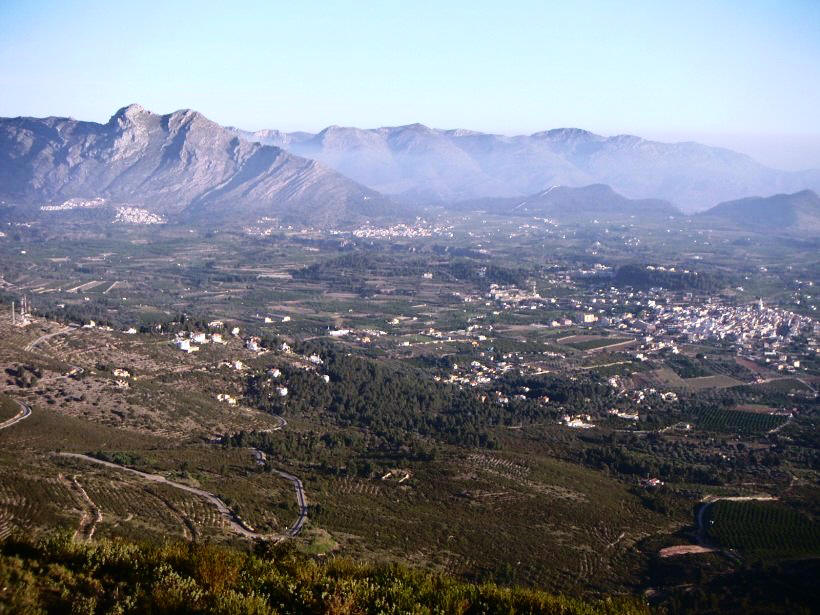 Vista de la Vall de Pop. Al fons i a l'esquerra la muntanya del Cavall Verd o de Pop. Valls de Pego. Al fons i a l'esquerra la muntanya del Cavall Verd.